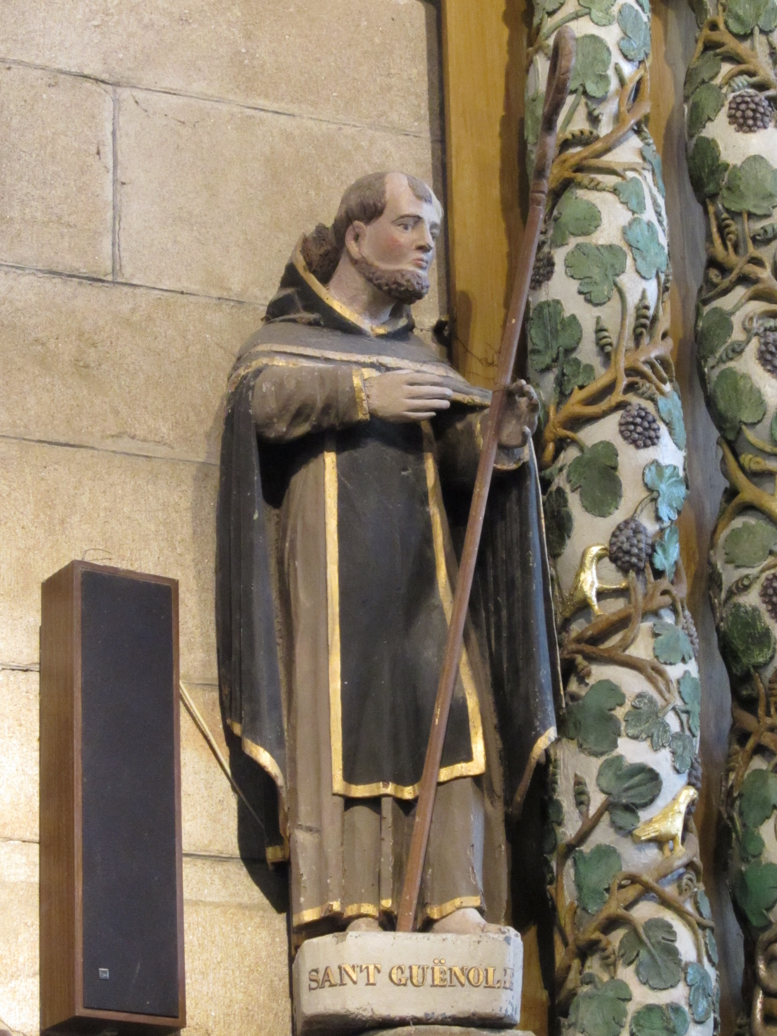 Statue de Saint Guénolé dans l’Église Saint Germain de Pleyben.